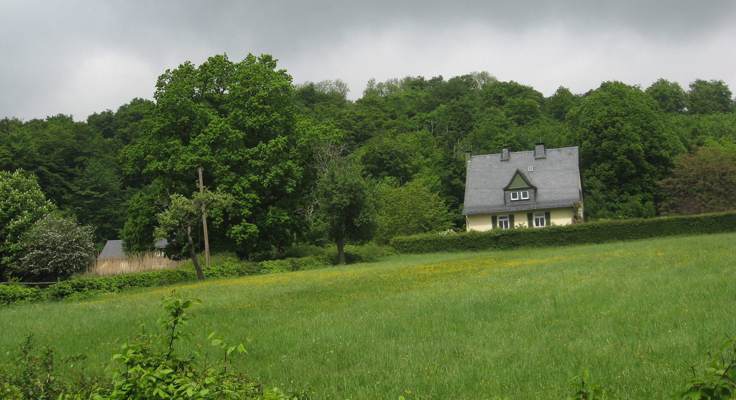 Forsthaus Wildenburg near Mengerschied in the Hunsrück landscape, Germany.